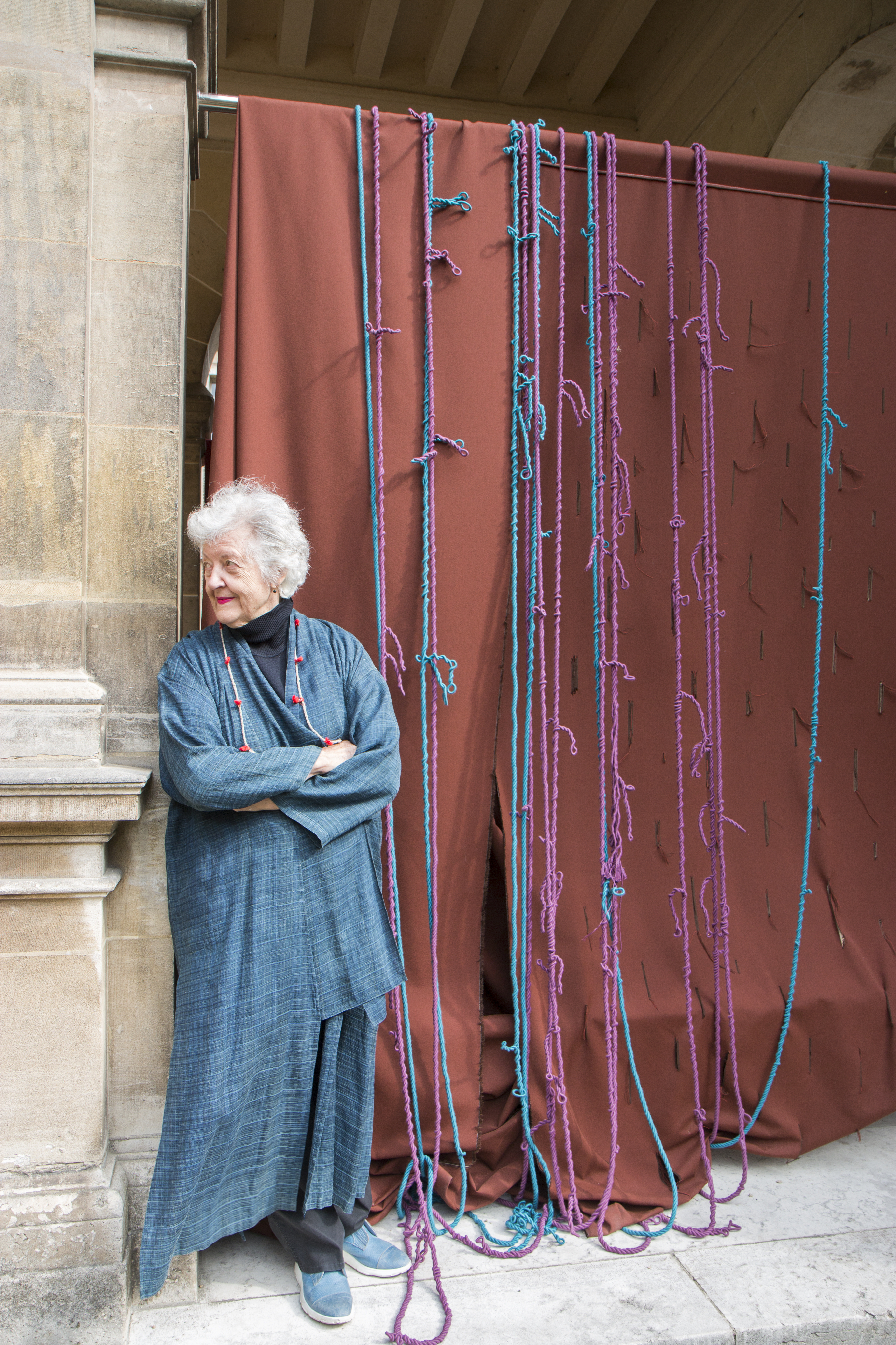 Sheila Hicks au Musée Carnavalet, 2016. Photographie par Cristobal Zanartu